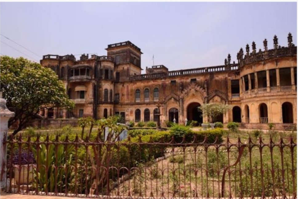 यह महमुदाबाद के राजा का क़िला है